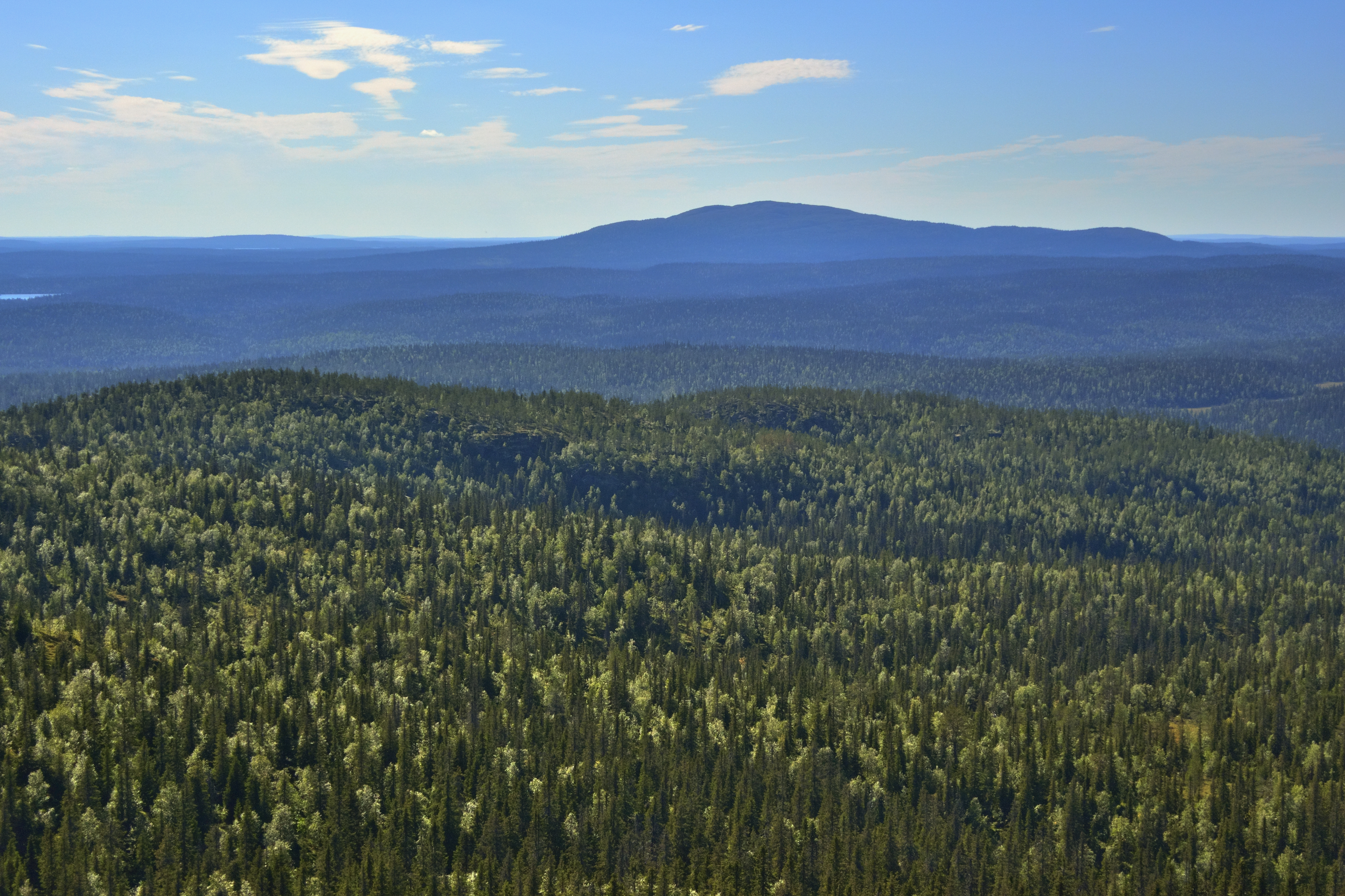 Паанаярви: Западная граница национального парка совпадает с государственной границей России с Финляндией. Со стороны финской границы к “Паанаярви” примыкает национальный парк “Оуланка”,Лоухский район, This image is related to the protected area of Russia number 1000069